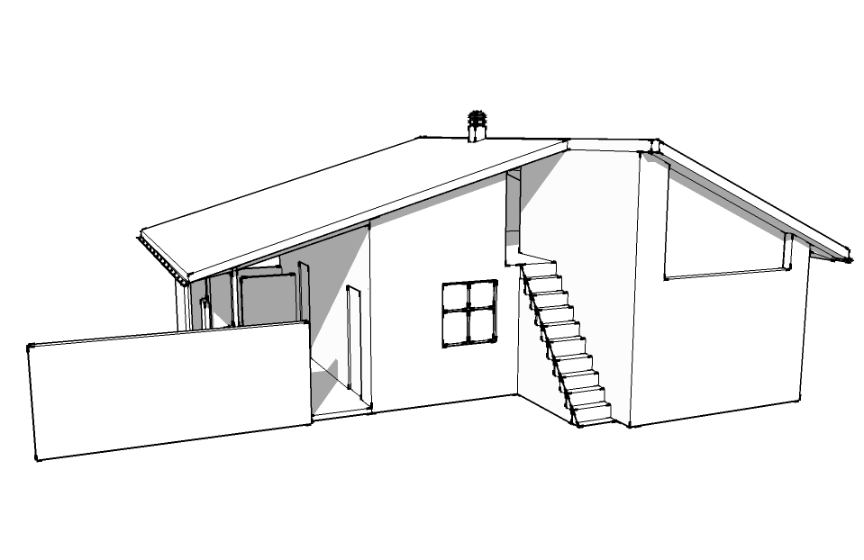 Veduta esterna della Casa rurale, progettata e realizzata dagli architetti Piero De Amicis e Vincenzo Manente, collocata nel Parco realizzata per la X edizione della Triennale di Milano